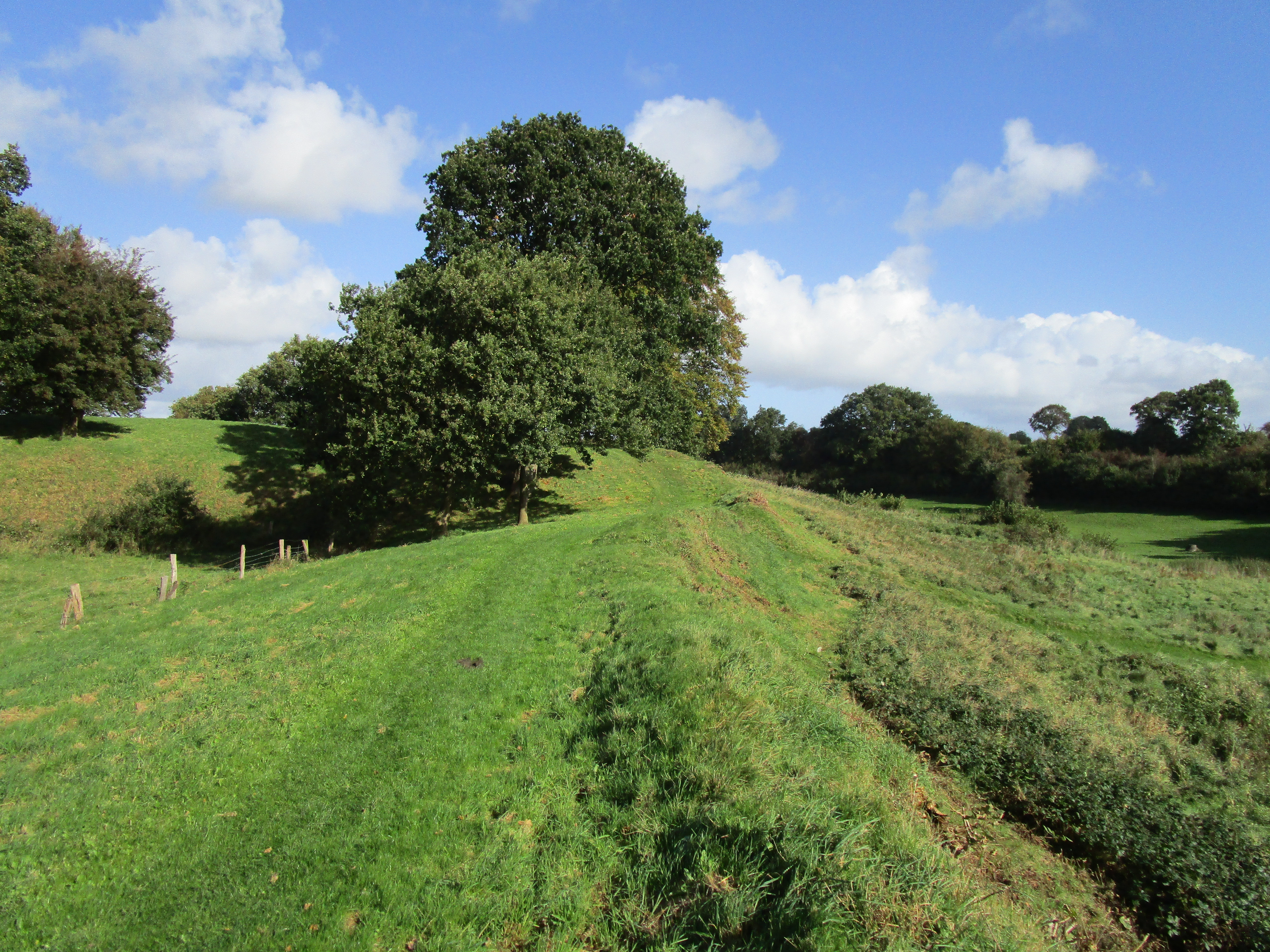 Thyraborg og den udtørrede Dannevirke Sø